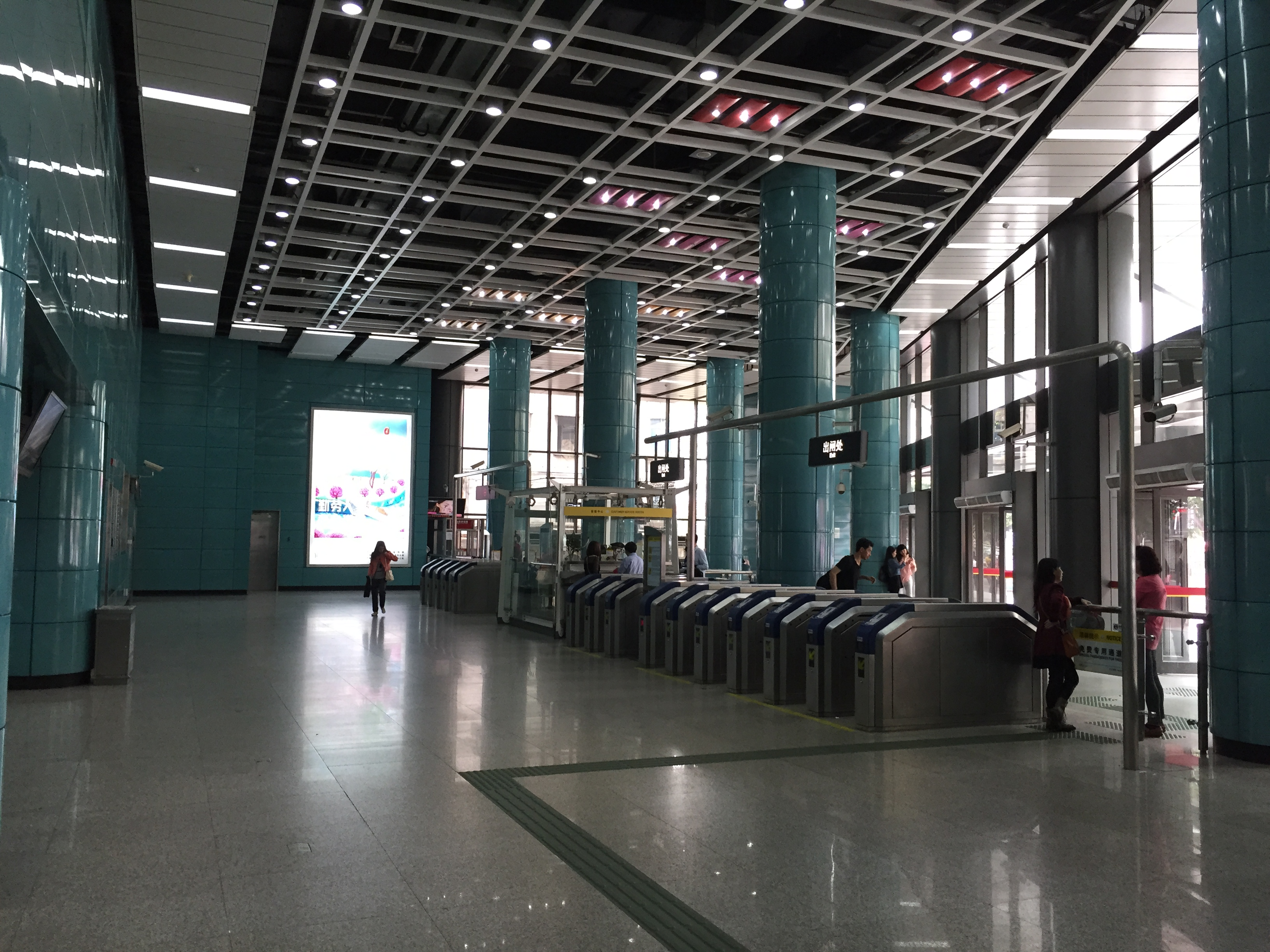 广州地铁区庄站地面站厅